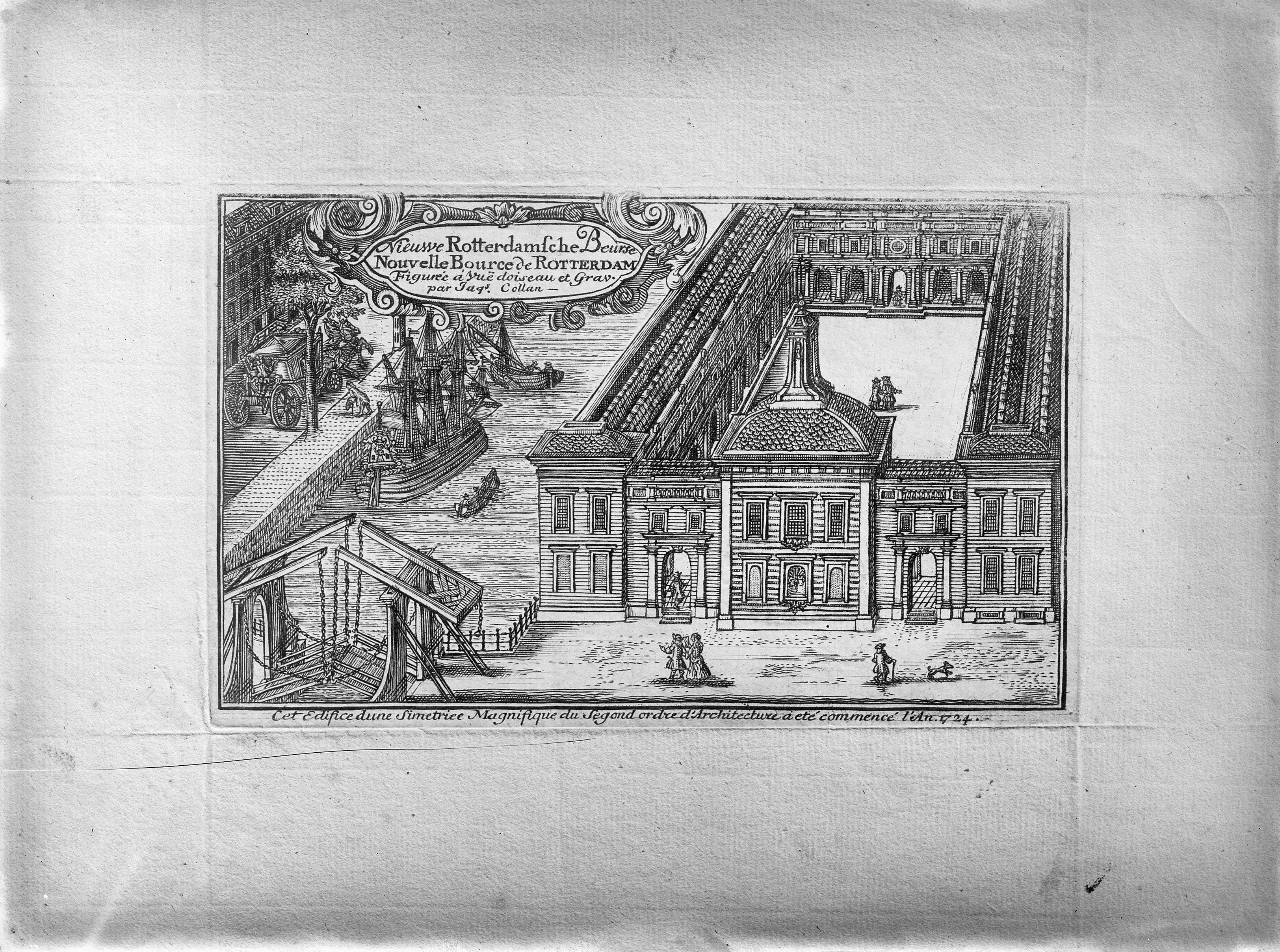 Beurs van Rotterdam: naar een gravure van Jacques Collan (1702-1728). "Nieuwe Rotterdamsche Beurse / Nouvelle Bourse de Rotterdam / Figurée à vuë doiseau et Grav. / par Jaqs Collan". "Cet edifice d'un Simetriee Magnifique du Segond ordre d'Architecture a été commencé l'An 1724"